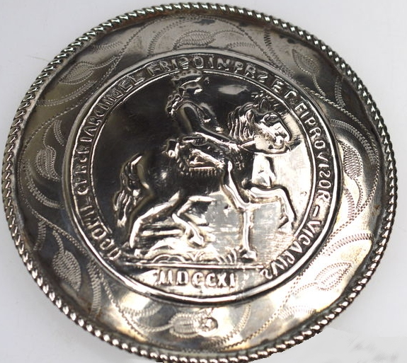 waarschijnlijk moderne kopie van oude penning, voorstellende Johan Willem van de Palts als ruiter, met het jaartal 1711, toegepast op een axelse stikke (een helft van een dubbele knoop)